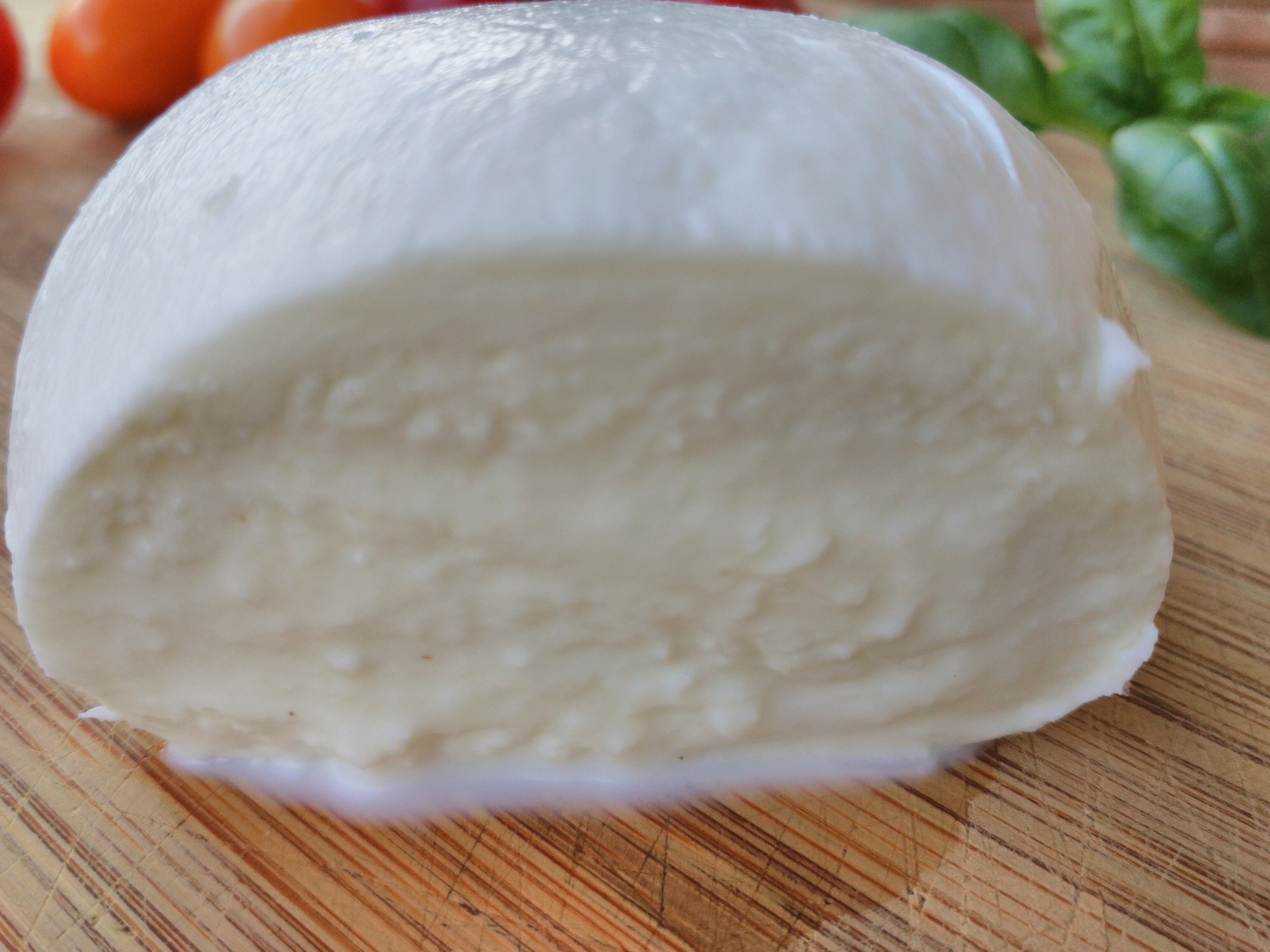 buffalo mozzarella